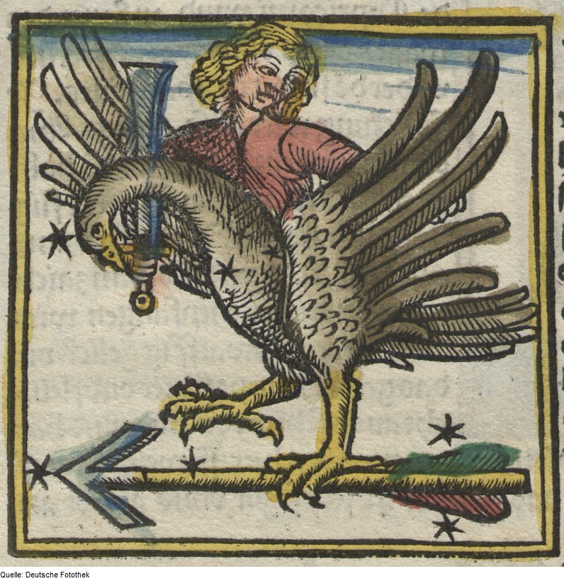 Original image description from the Deutsche Fotothek Astronomie & Sternbild